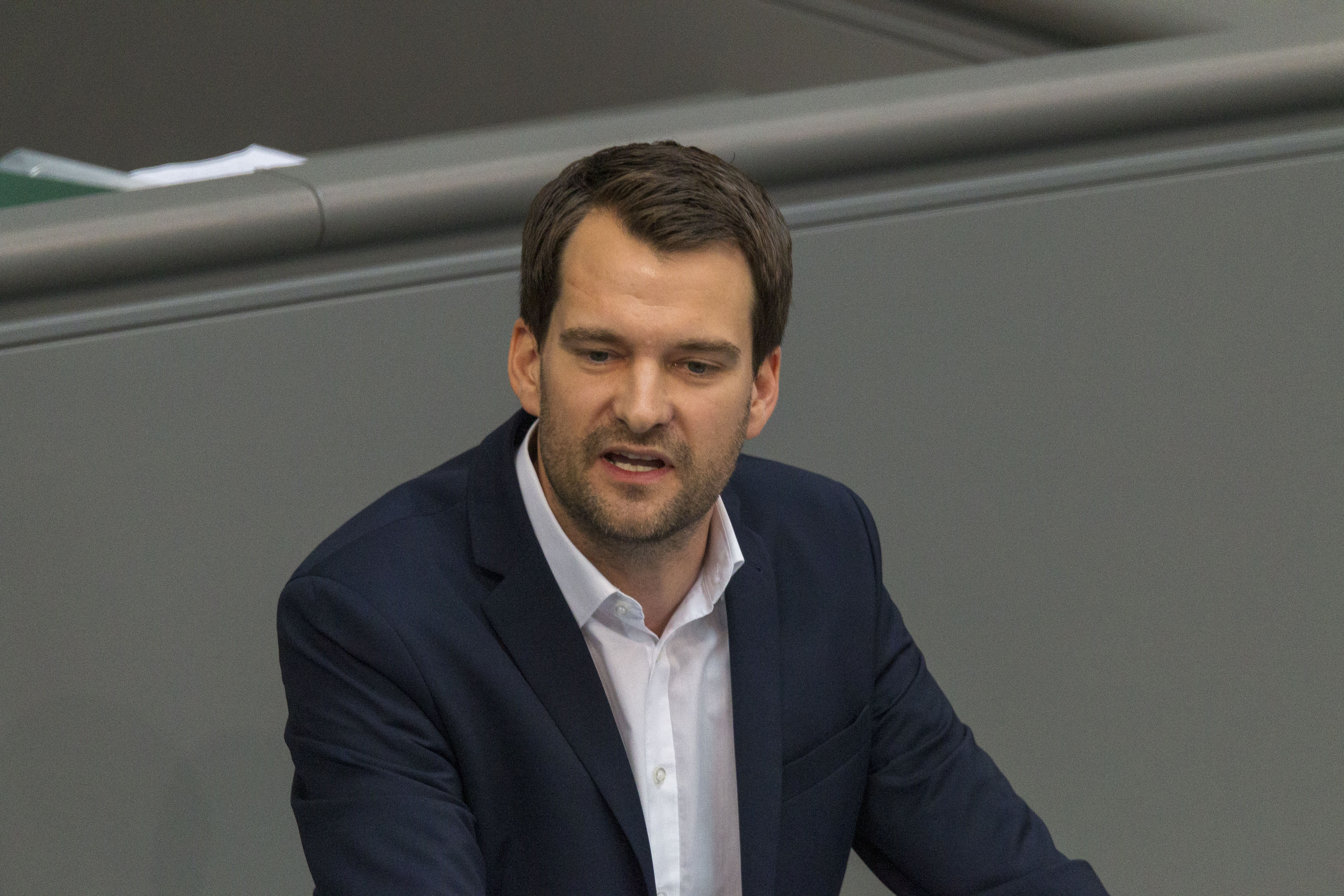 Johannes Vogel während einer Plenarsitzung des Deutschen Bundestages am 2. Juli 2020 in Berlin.